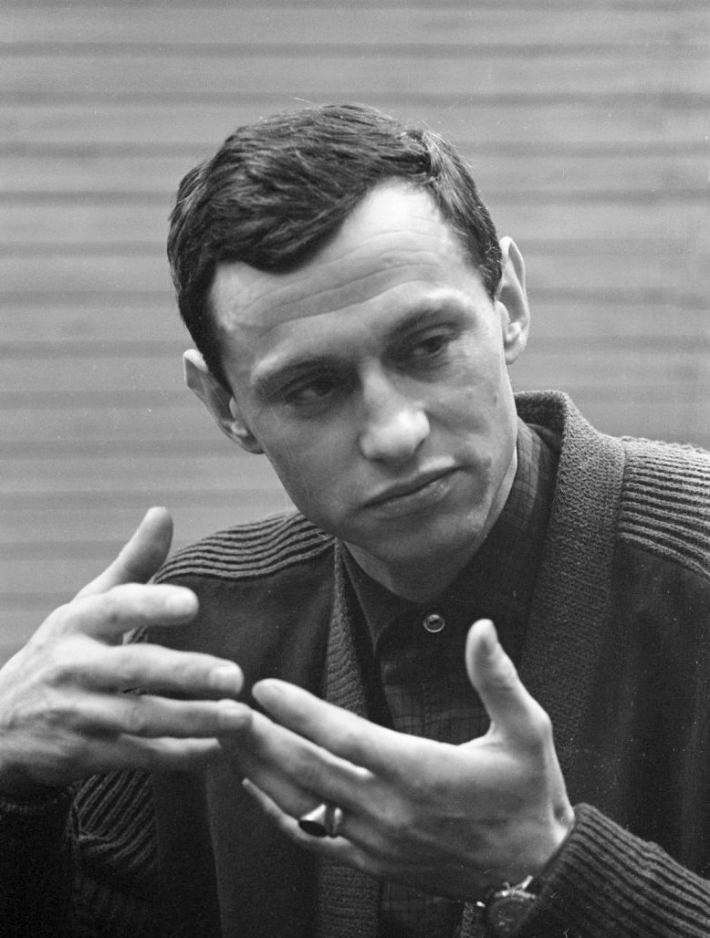 Aankomst van der Grift op Schiphol. Van der Grift